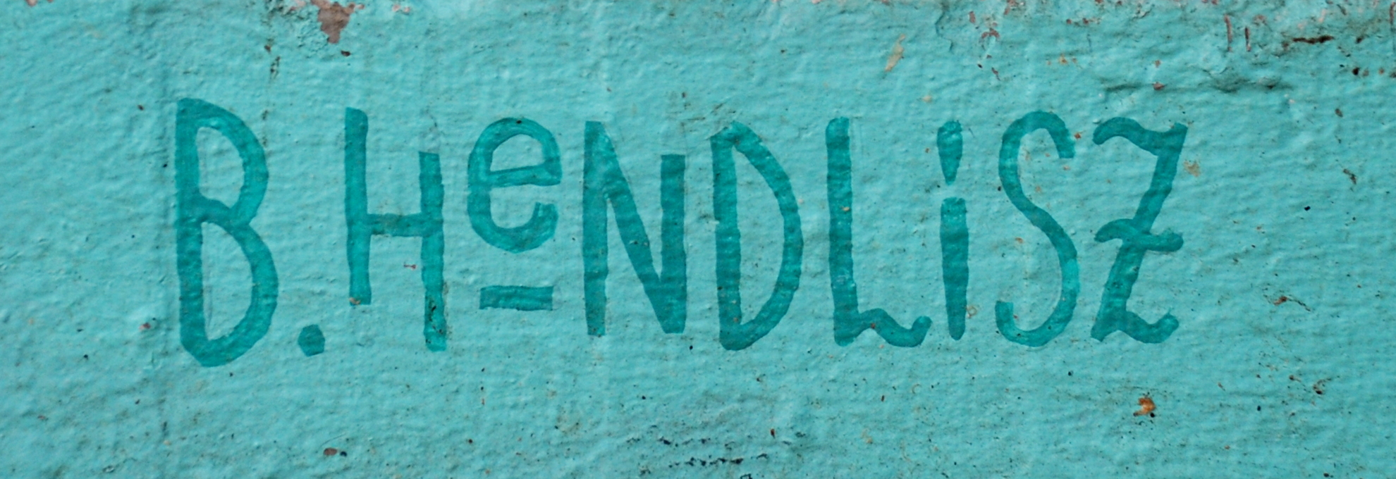 Belgique - Louvain-la-Neuve - Place des Wallons - Cage d'escalier ornée de peintures murales